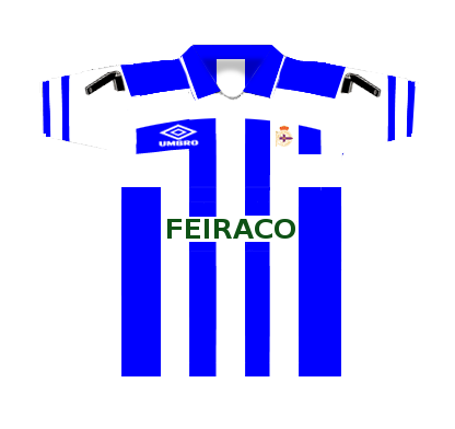 Camisa do La corunha usada pelo Botafogo em 1996